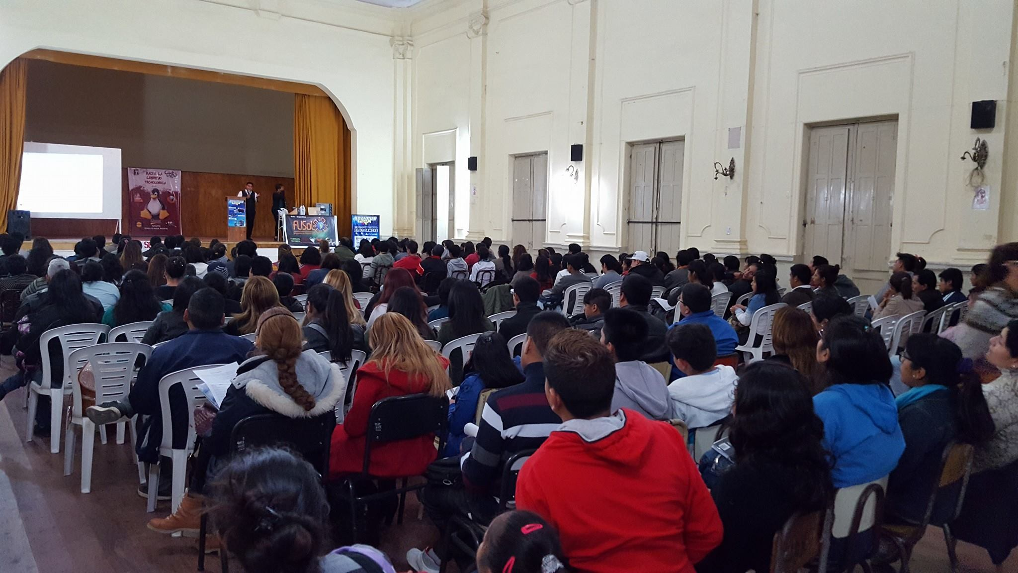 Software Freedom Day 2016 en Salta, Argentina.